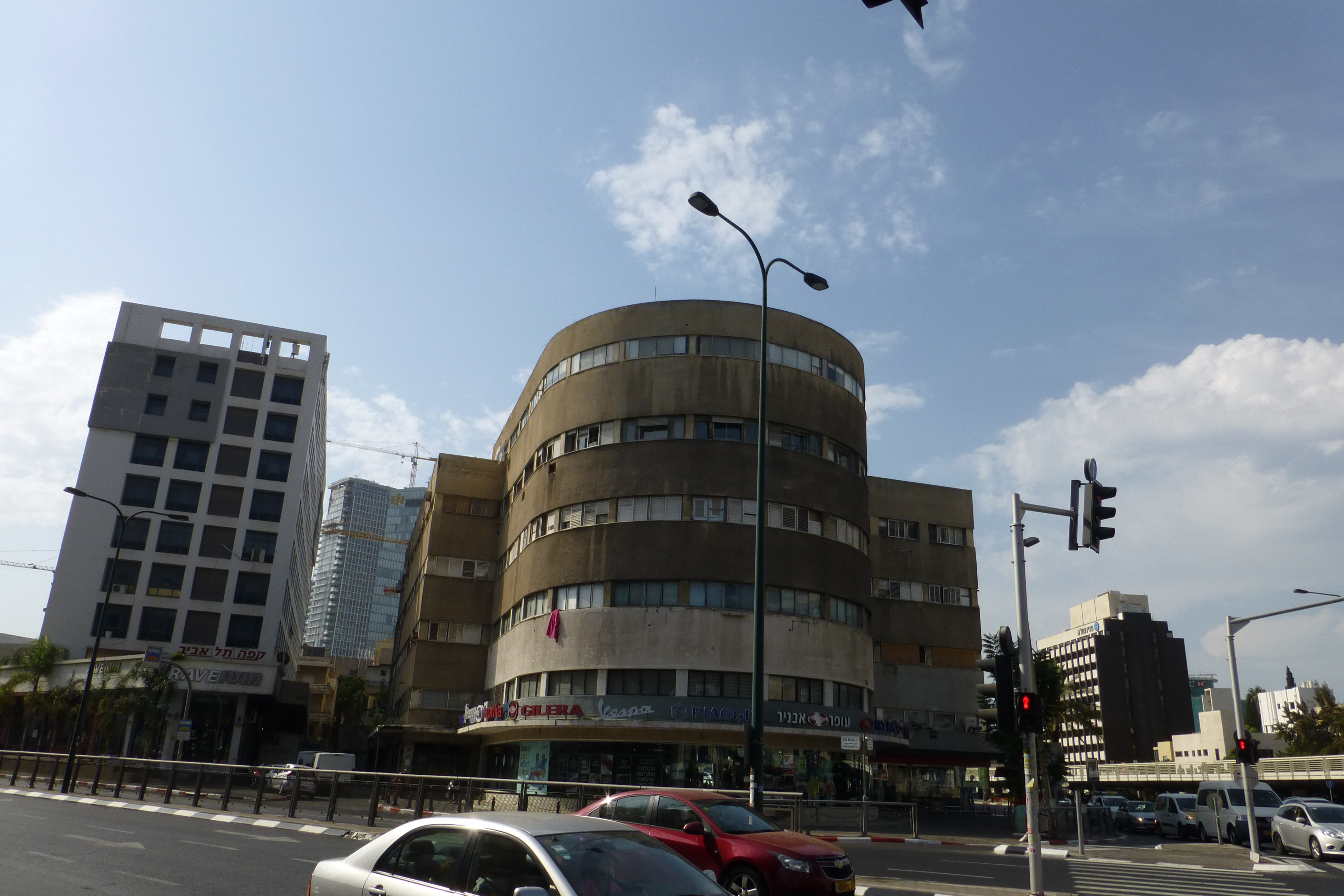 בית הדר הוא בניין המשרדים הראשון שנבנה בתל אביב. הבניין תוכנן ב-1934 על ידי האדריכל קרל רובין והוקם בין השנים 1936 ו-1938. מבנה זה הוא גם הבניין הראשון שנבנה כשלד פלדה, סוג בנייה נדיר יחסית בארץ.